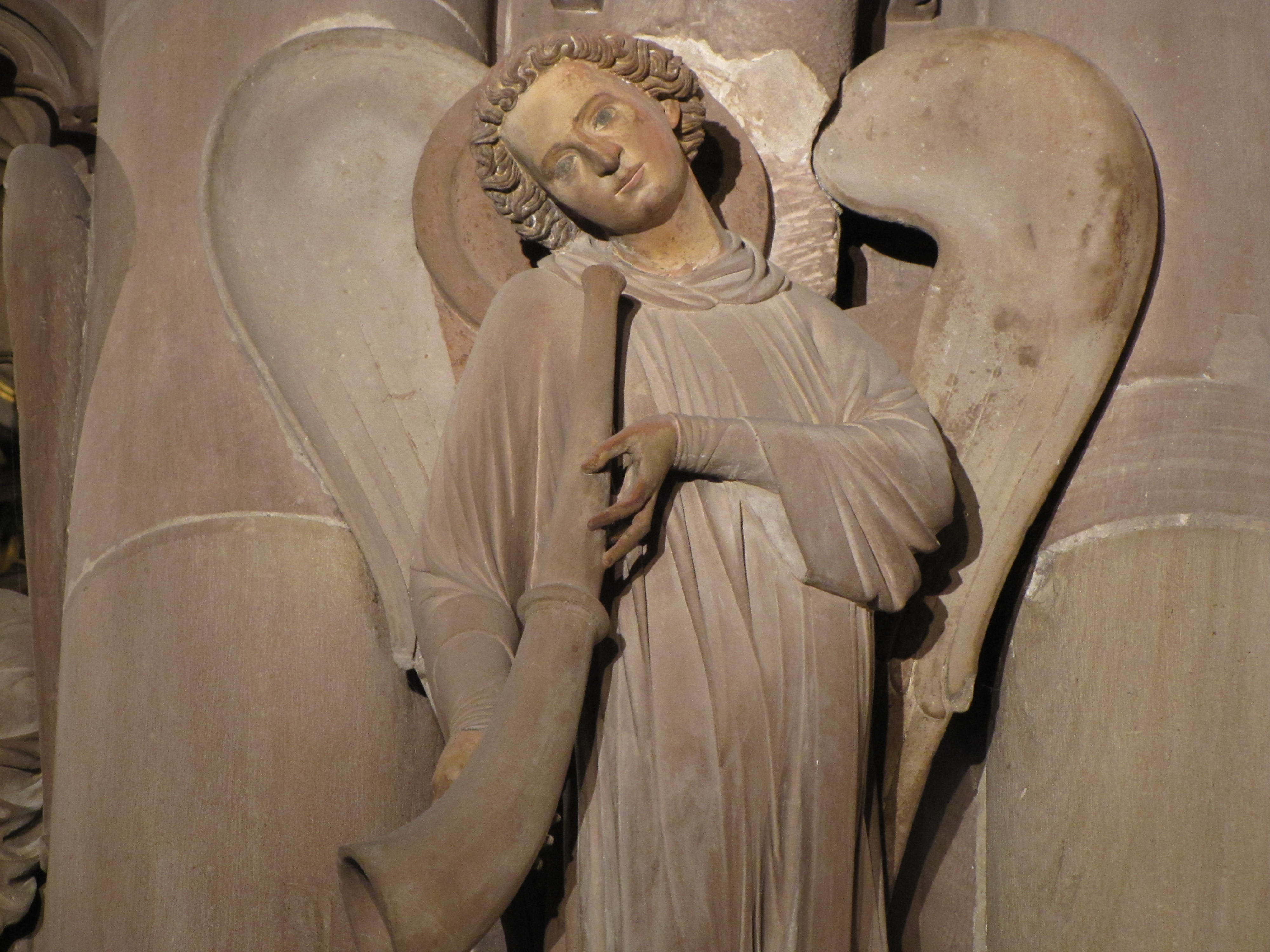 Alsace, Bas-Rhin, Cathédrale Notre-Dame de Strasbourg (PA00085015).Croisillon sud, Pilier des Anges (XIIIe): ange musicien